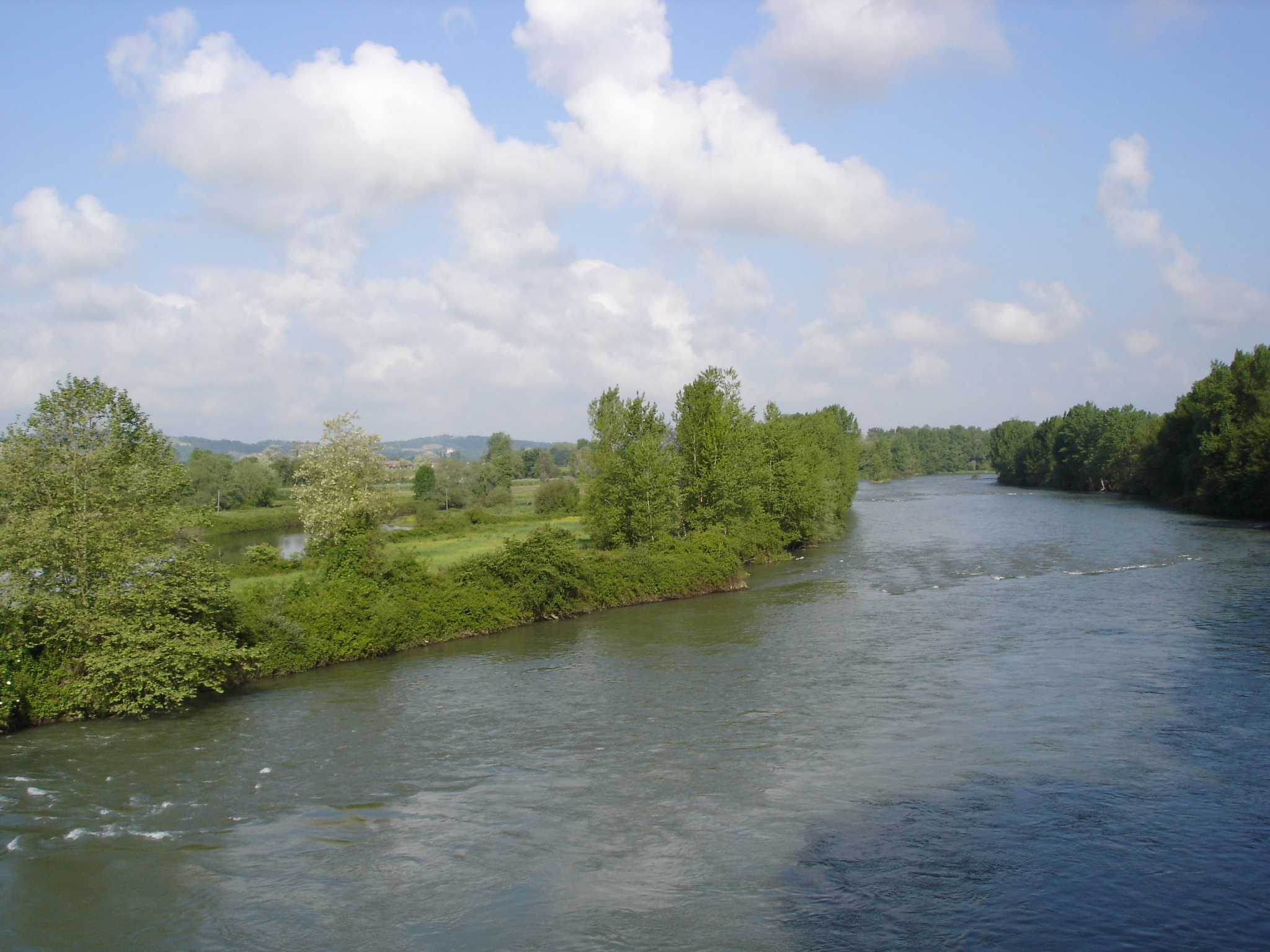 Le gave de Pau depuis le pont d'Argagnon -- Photo amateur prise par moi-même